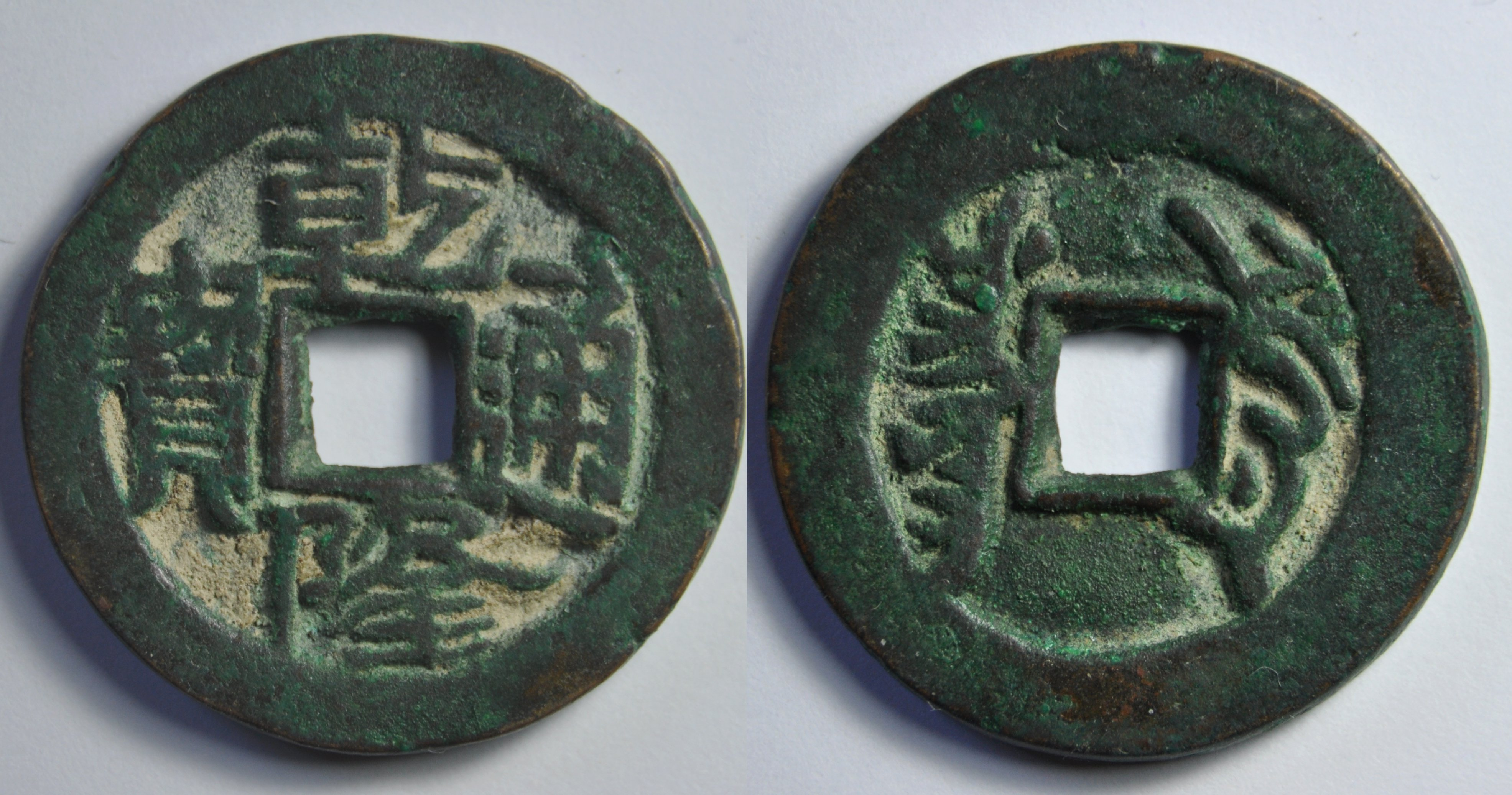 Une monnaie en cuivre d'une sapèque de l'empereur Gaozong (1736-1795) ère Qian Long (1736-1795) de la dynastie Qing (1644-1912) pour la province du Xinjiang à Yarkang. Cette province a été conquise en 1759. A/ Qian Long tong bao (Monnaie courante de Qian Long) (Lecture en croix : haut-bas-droite-gauche) R/ Yerkiyang à gauche, Y(a)rk(a)nd à droite Dimension : 26.41 mm (diamètre), 2.32 mm (épaisseur) Poids : 7.3 g. Référence : H22.437 Remarque : La monnaie est plus épaisse que d'habitude (environ 1.4 mm) et son poids plus lourd. Les ateliers monétaires ont fonctionné de 1760 à 1769 pour cet atelier qui a changé de nom en 1761. Avant il s'appelait Yerkim (H22.435-H22.436) puis devient Yarkand mais rien ne dit si l'inscription a changé à la même date. Il s'agit d'une belle monnaie. Indice de rareté : 11 (Commune) (D'après D.Hartill)